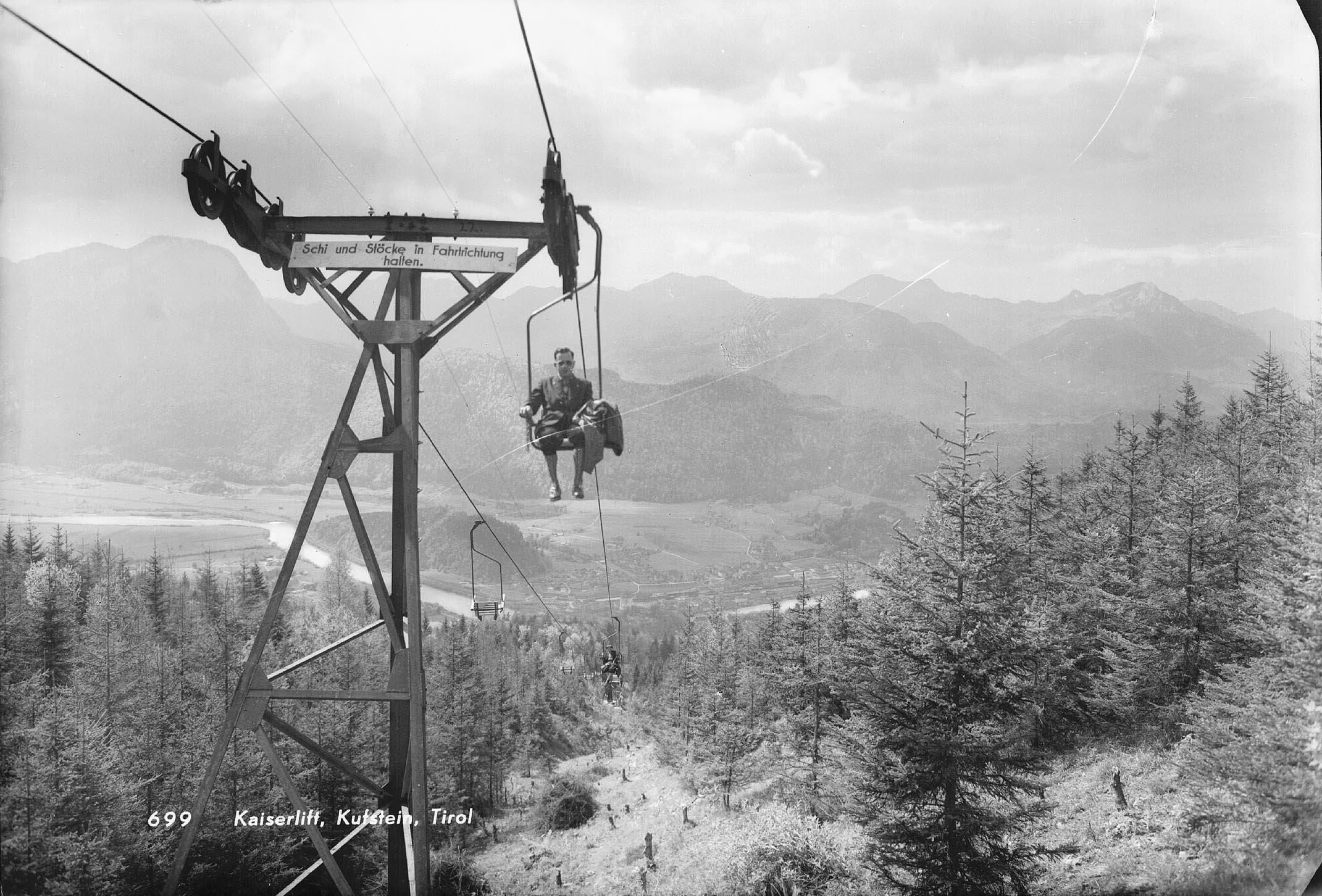 Kaiserlift, Kufstein, Tirol